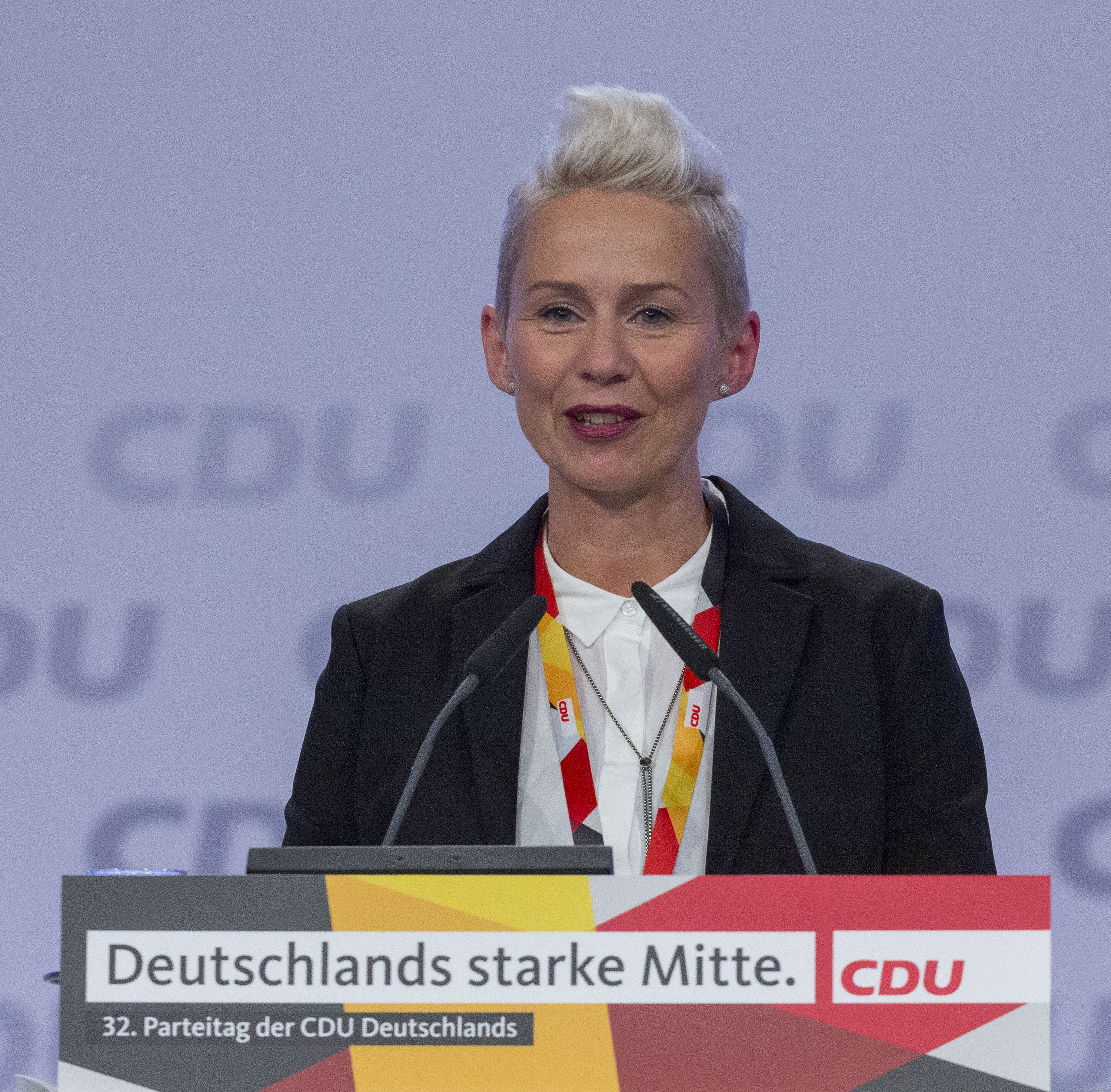 Silvia Breher auf dem CDU Parteitag 2019 am 22. November 2019 in Leipzig.